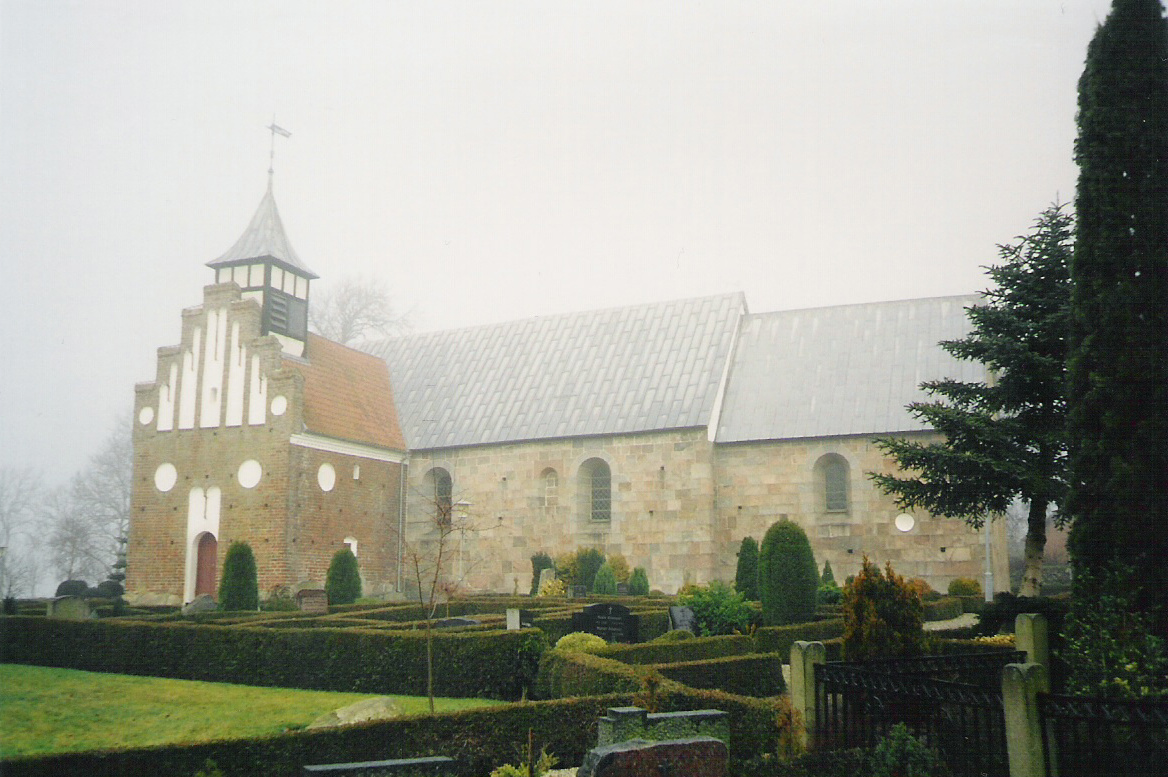 Lime Kirke i Østjylland. Fotograferet i februar 2000